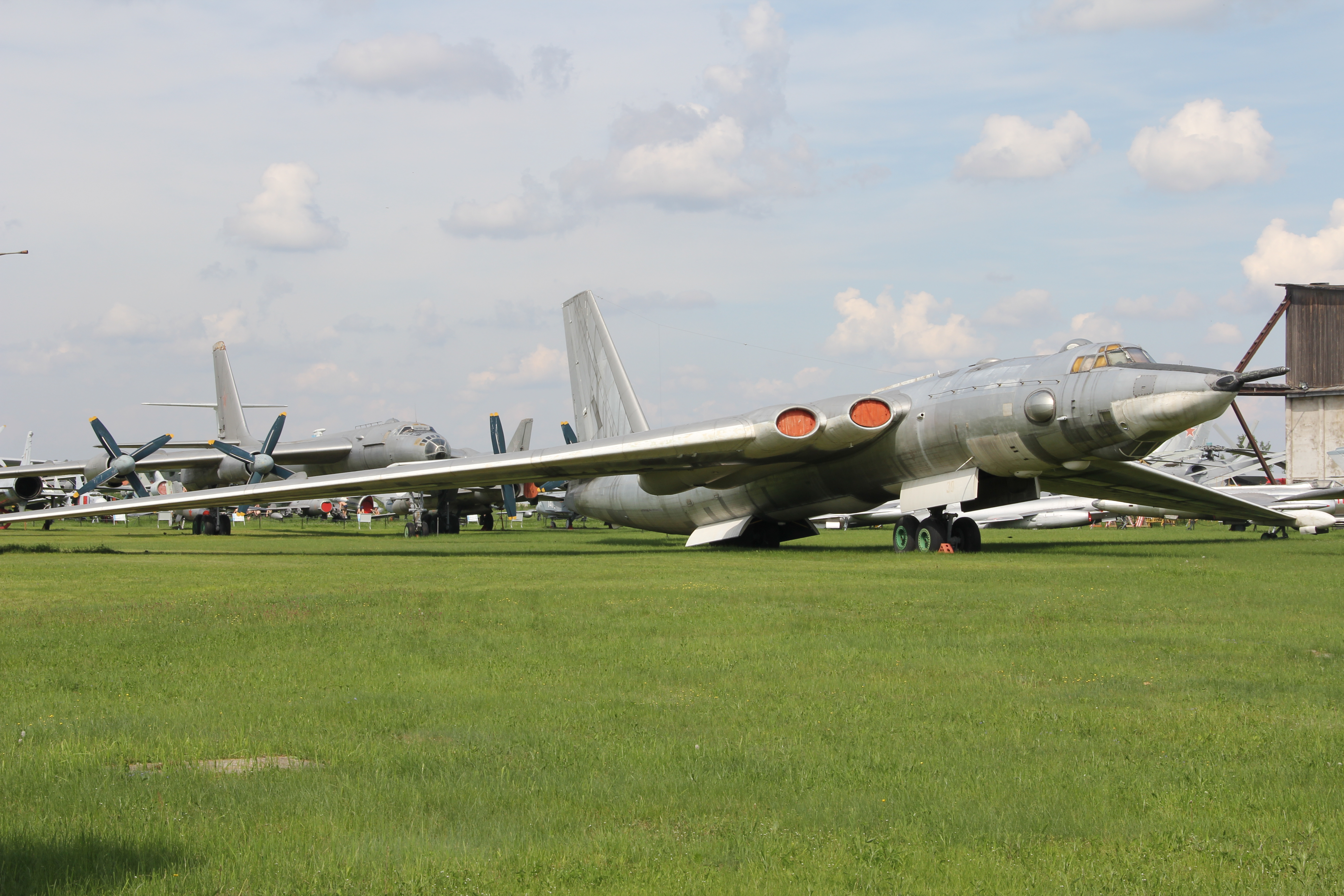 Myasischev M-4/3M